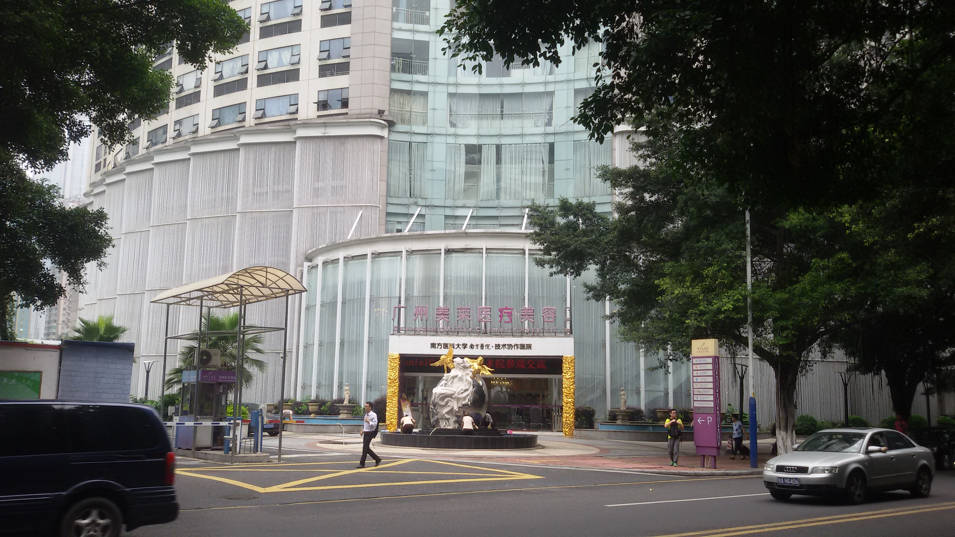 粵語: 廣州美萊醫療美容醫院